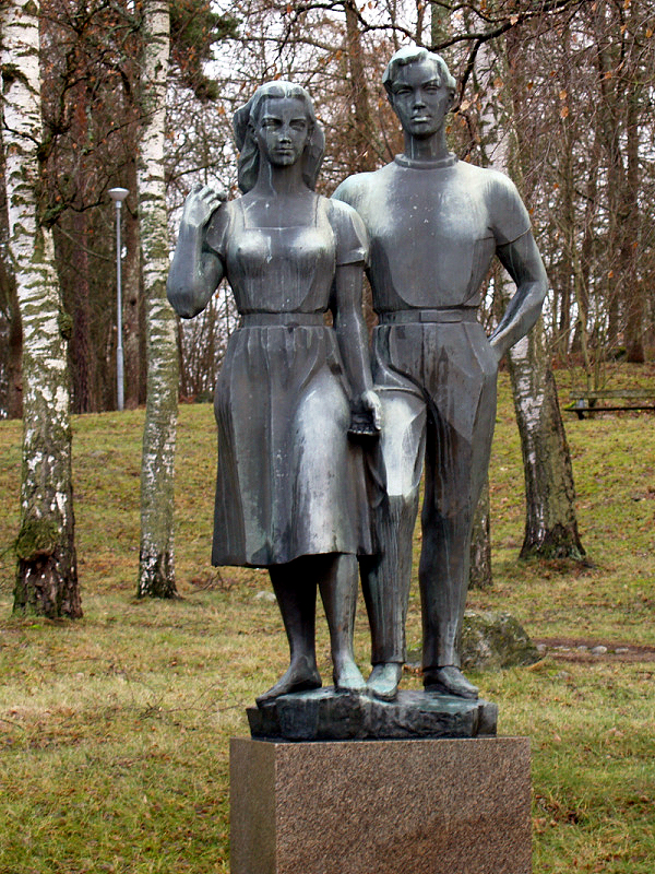 Foto av staty vid namn Sommarsöndag i brons (1951-1952) av Oscar Antonsson (1898-1960). Finns i Västerås invid Köpingsvägen vid Sundemans backe. (Mellan Stallhagen och Oxbacken.)